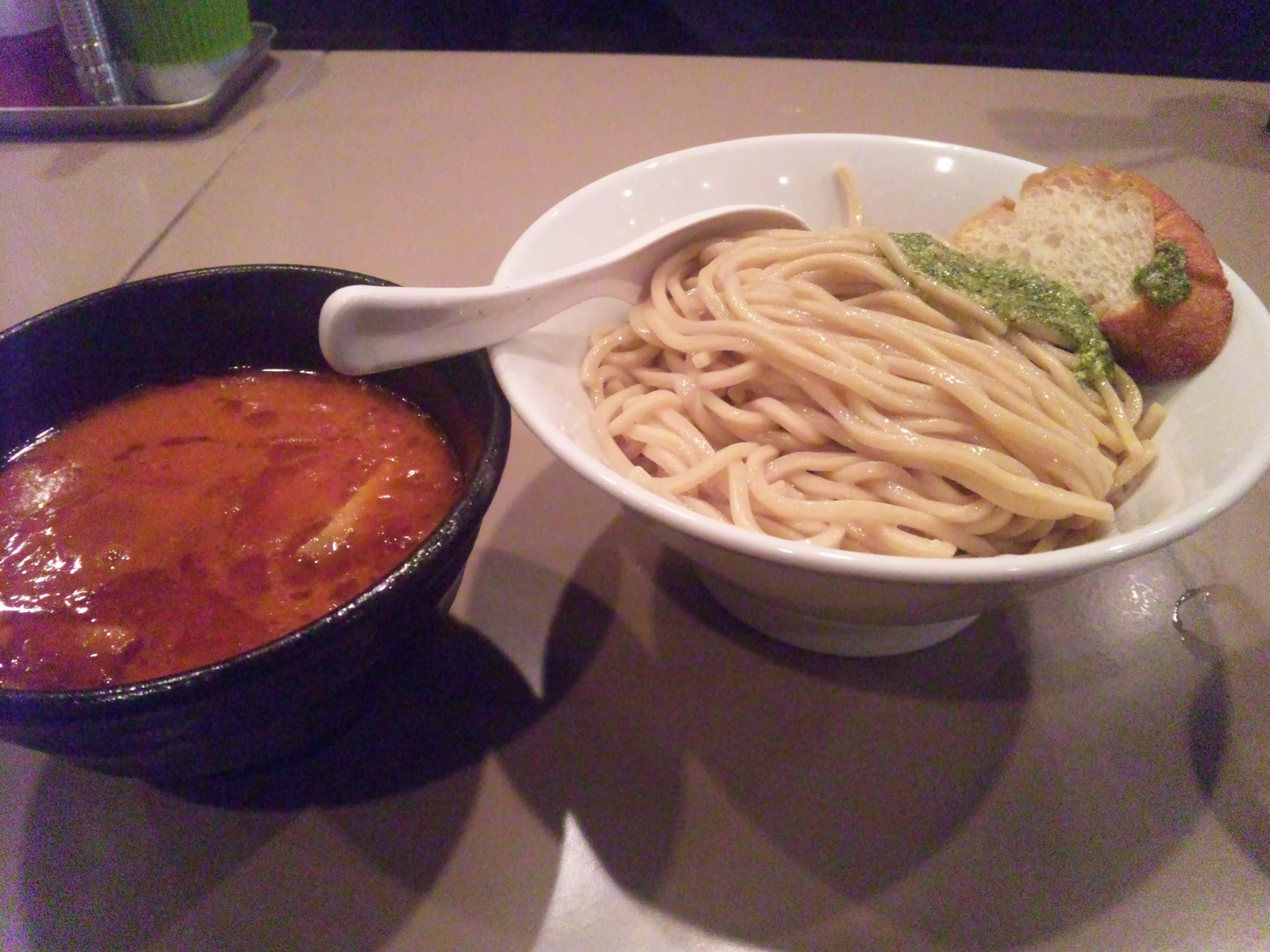 五ノ神製作所のトマトエビつけ麺